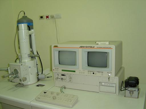 Hình chụp tại Trung tâm Khoa học Vật liệu, Đại học Khoa học Tự nhiên